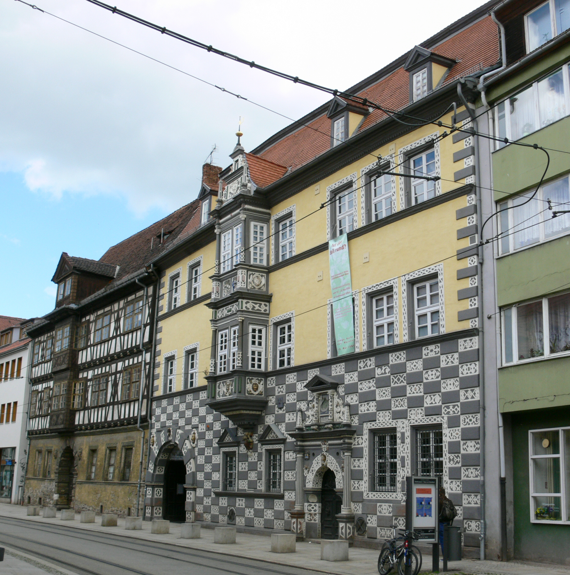 links: Haus zum Mohrenkopf (heutige Form zwischen 1607 und 1610 errichtet), in der Johannesstraße in Erfurt rechts: Haus zum Stockfisch (Stadtmuseum, aus mehreren Parzellen zwischen 1607 und 1610 zusammengefasst), in der Johannesstraße in Erfurt